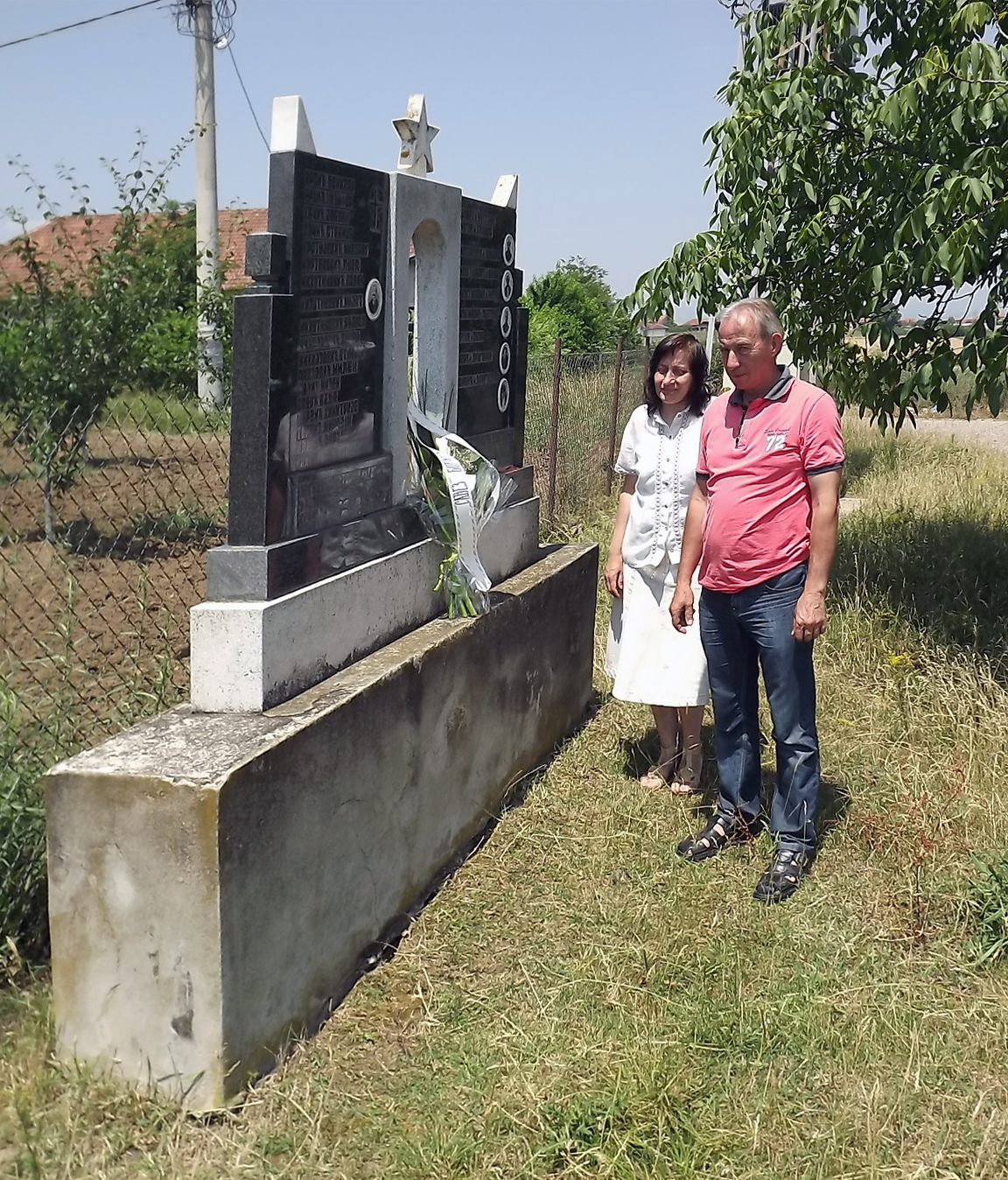 Spomenik borcima u oslobodilačkim ratovima, selo Golubovac. Fotografija nastala u okviru saradnje Narodnog univerziteta Trstenik, Narodne biblioteke Jefimija i Saveza boraca Trstenik